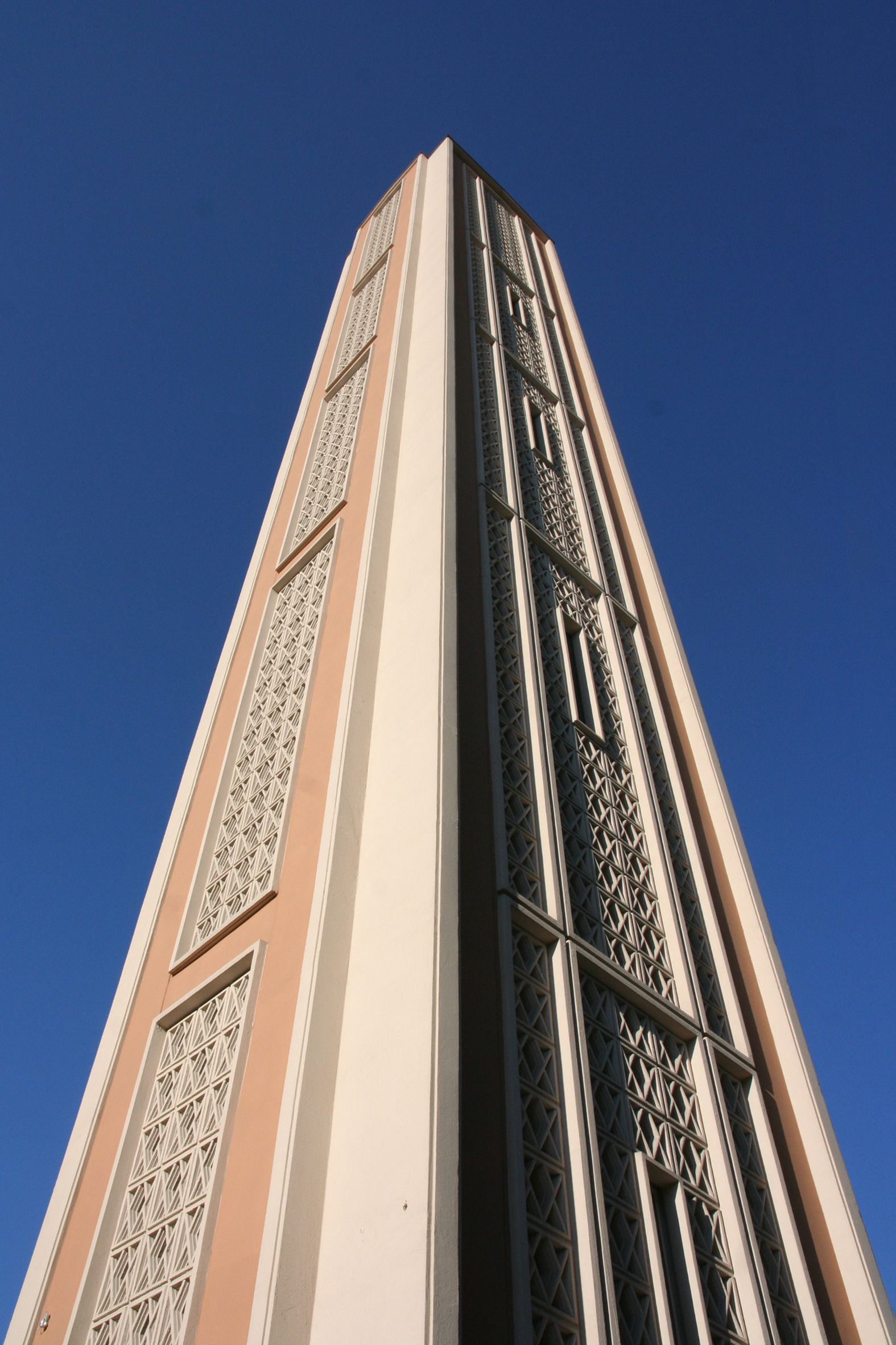 Römisch-Katholische Kirche St. Konrad Zürich-Albisrieden